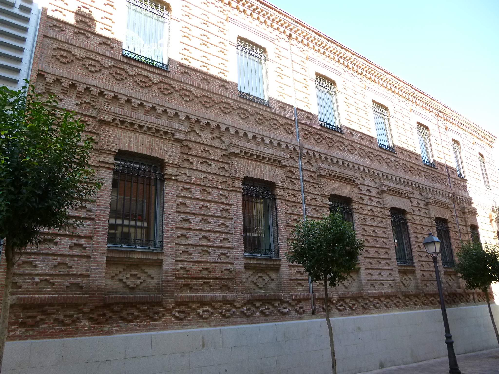 Instituto Psiquiátrico José Germain (Leganés, Madrid)